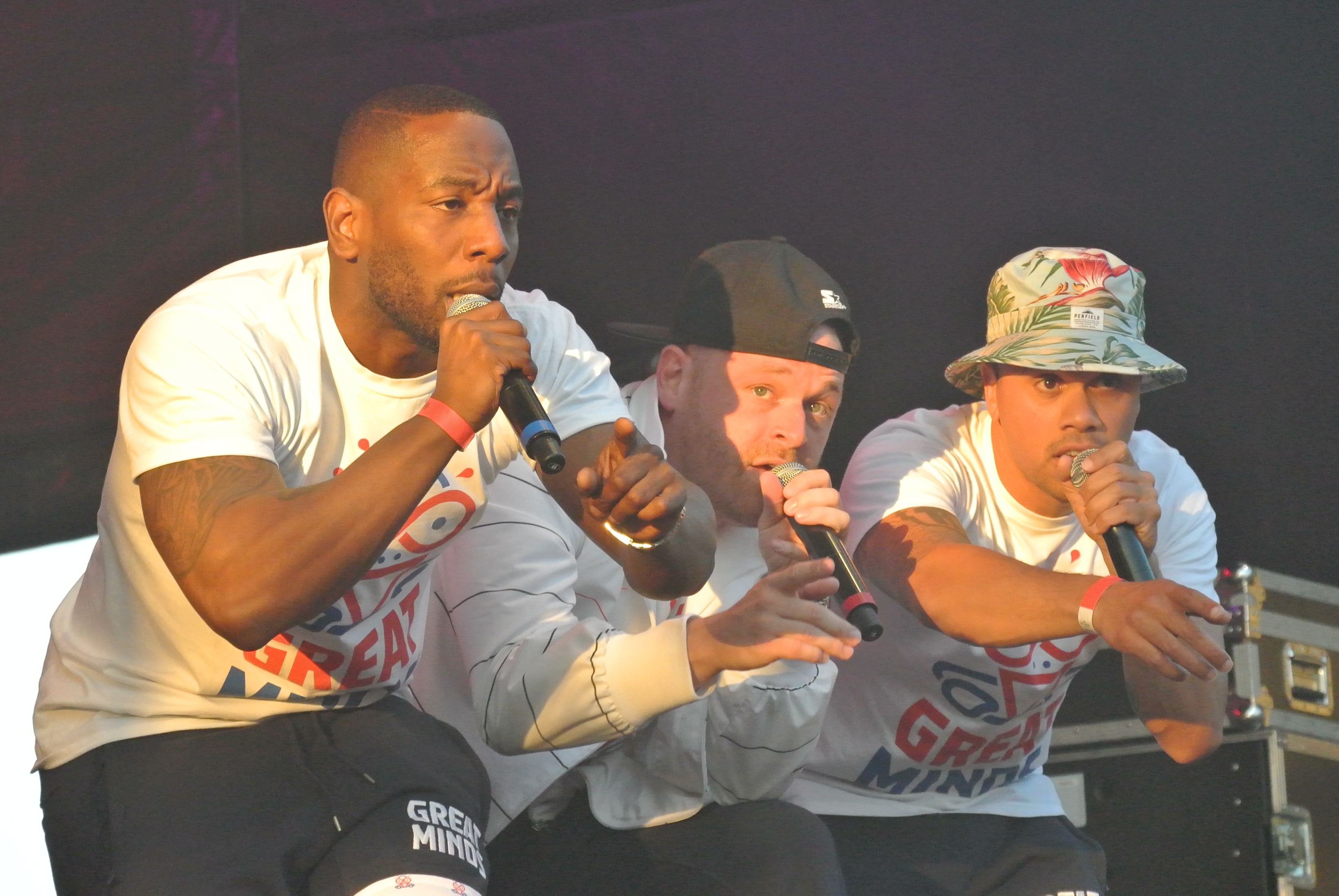 Winne, Sticks en Jiggy Djé van Great Minds op het FC Amersfoort Thuis festival